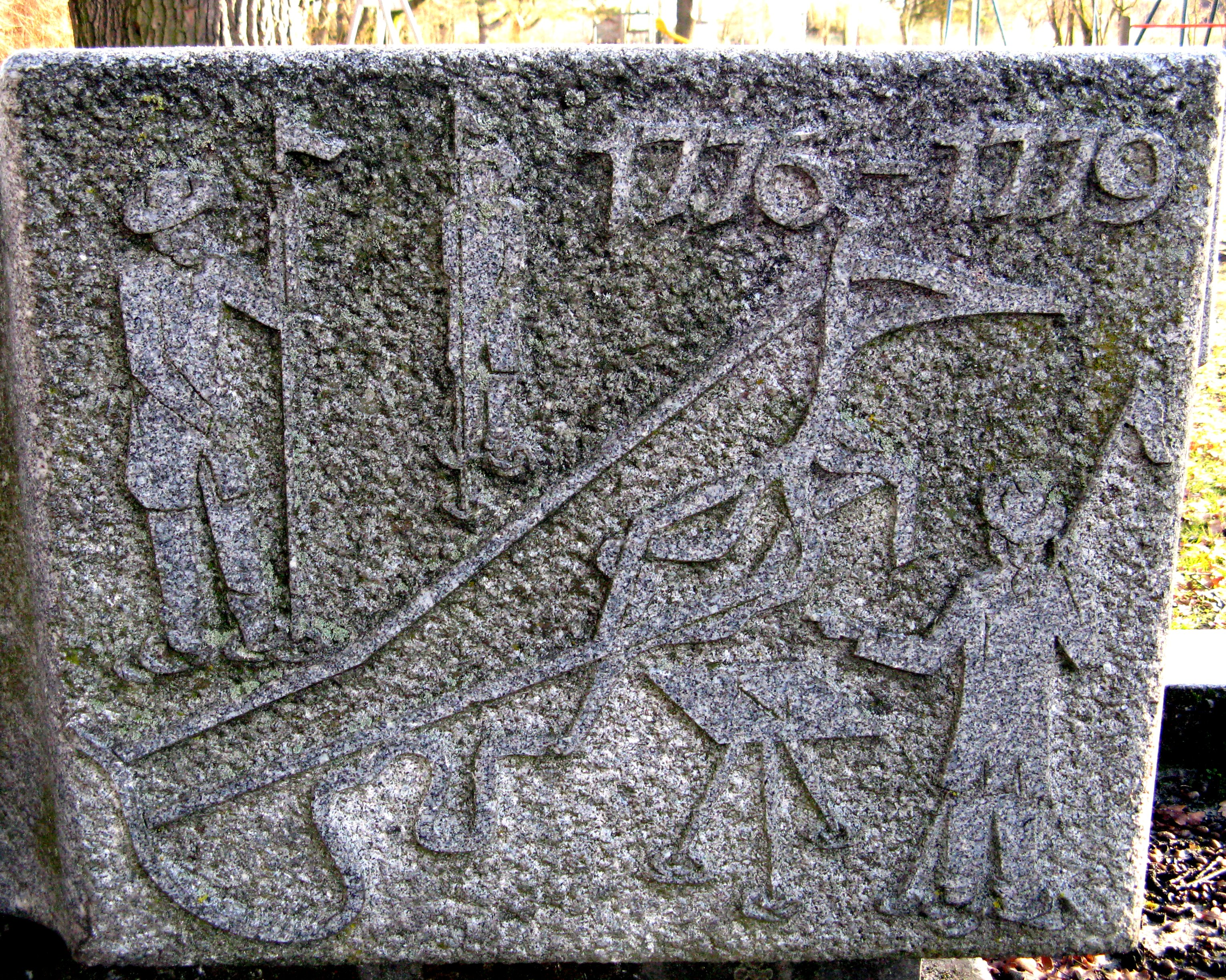 Detailansicht des von Radler-Wöß 1972 geschaffenen Brunnens, Erinnerung an die Naarnregulierungen im 18. und 20. Jahrhundert